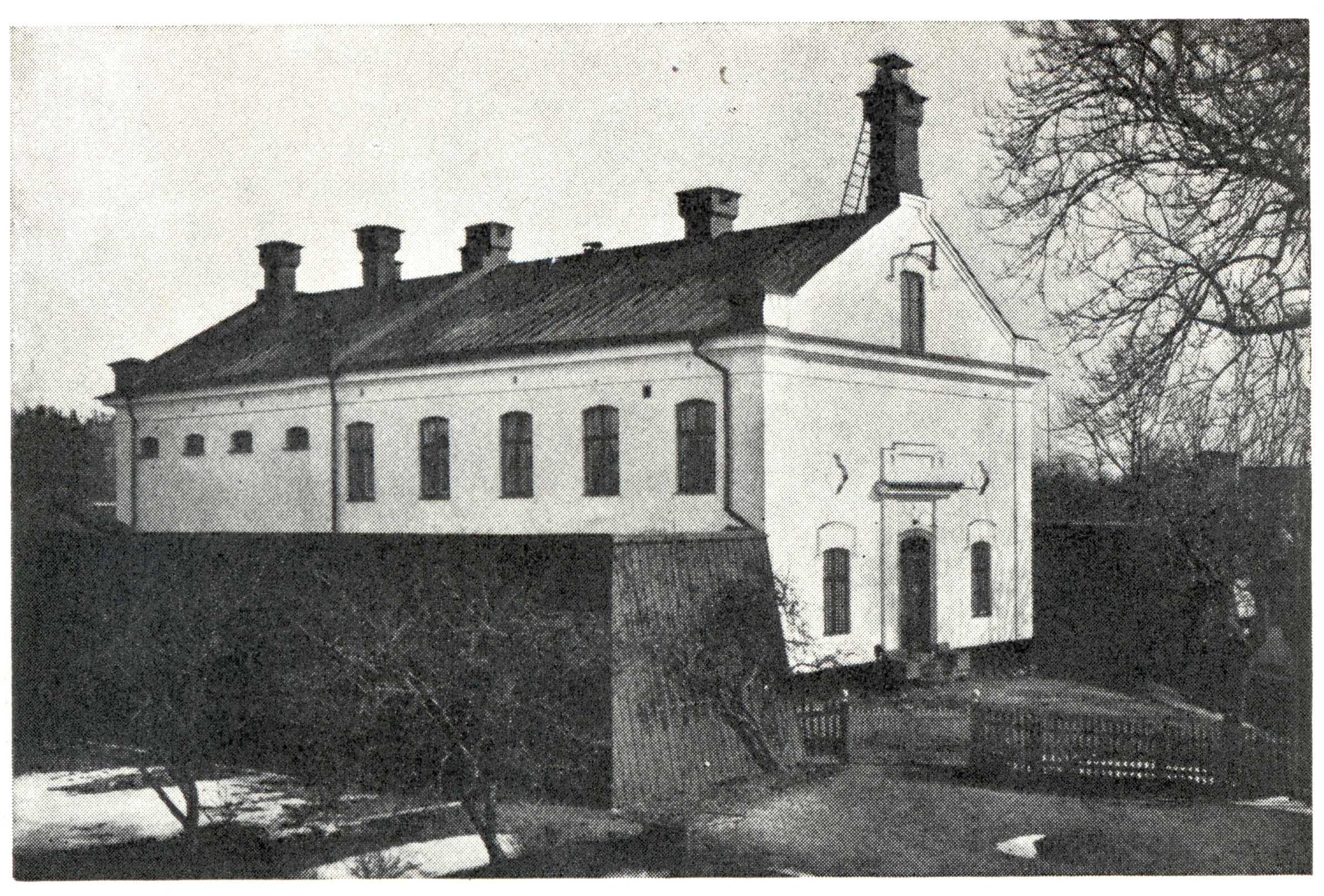 Kronohäktet i Norrtälje